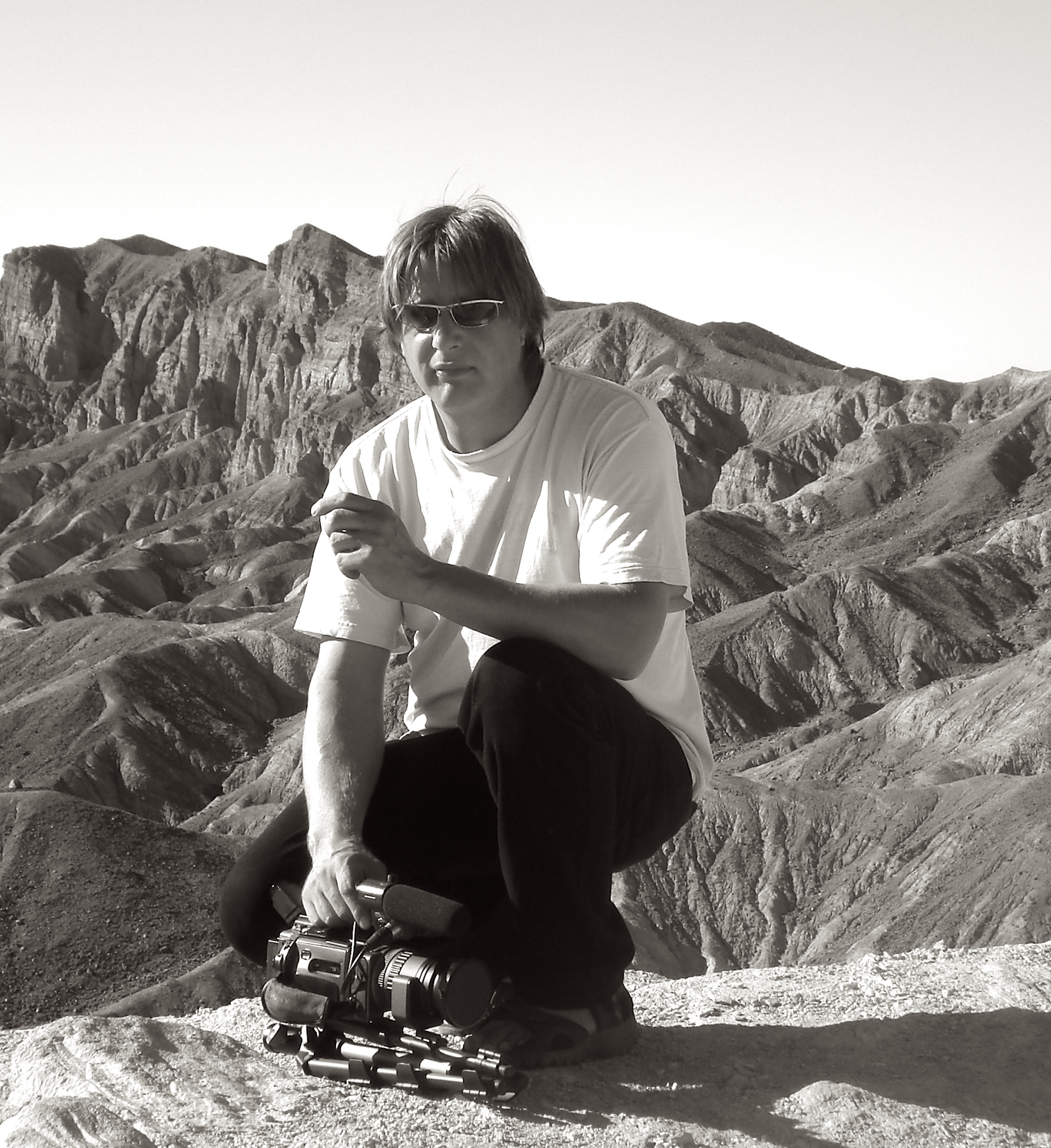 Zabriskie Point